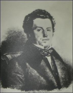 Charles Zoude, homme politique belge